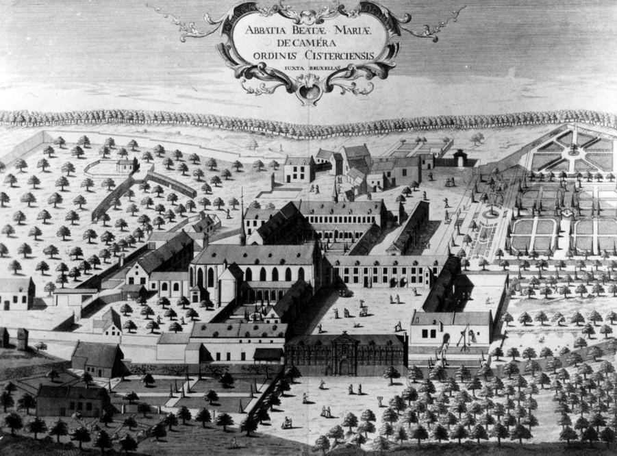 "Abbatia Beatæ Mariæ de Camera ordinis Cisterciensis iuxta Bruxellas" Le complexe abbatial de la Cambre d'après une gravure du début du XVIIème siècle.